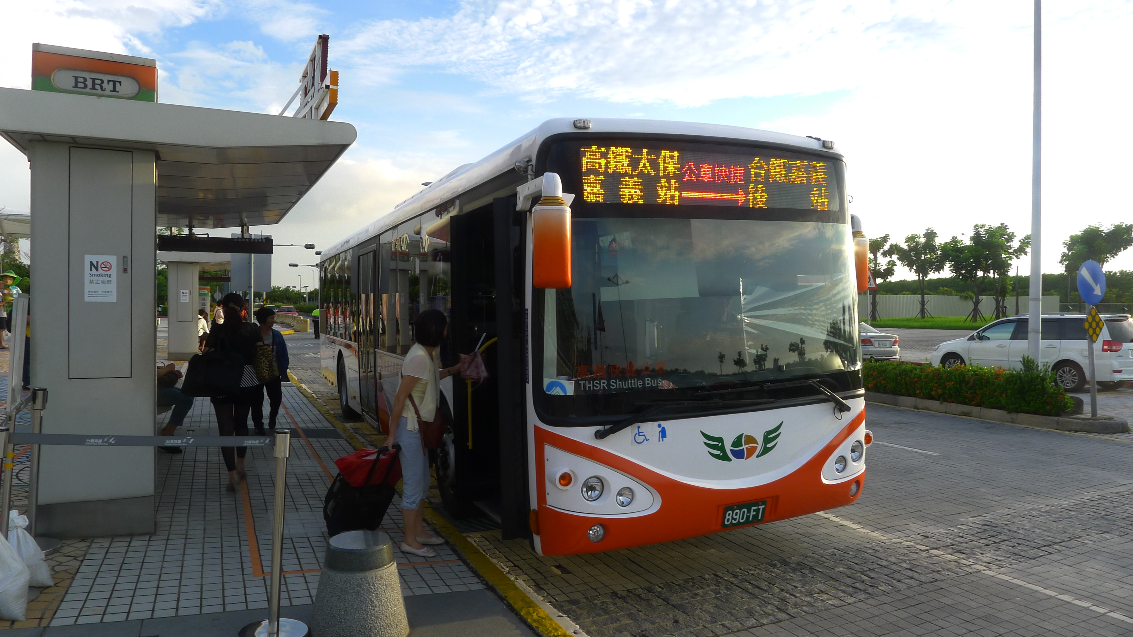 嘉義客運經營的嘉義BRT 路線編號7212 車號890-FT